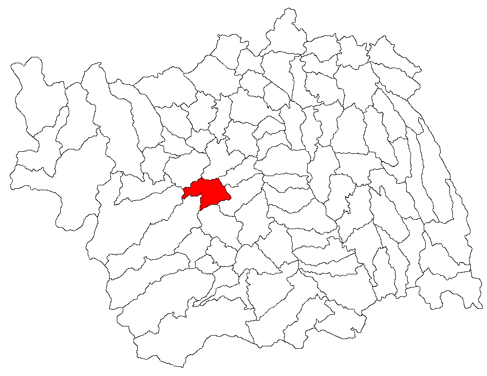 Categorie:Hărţi ale judeţului Bacău